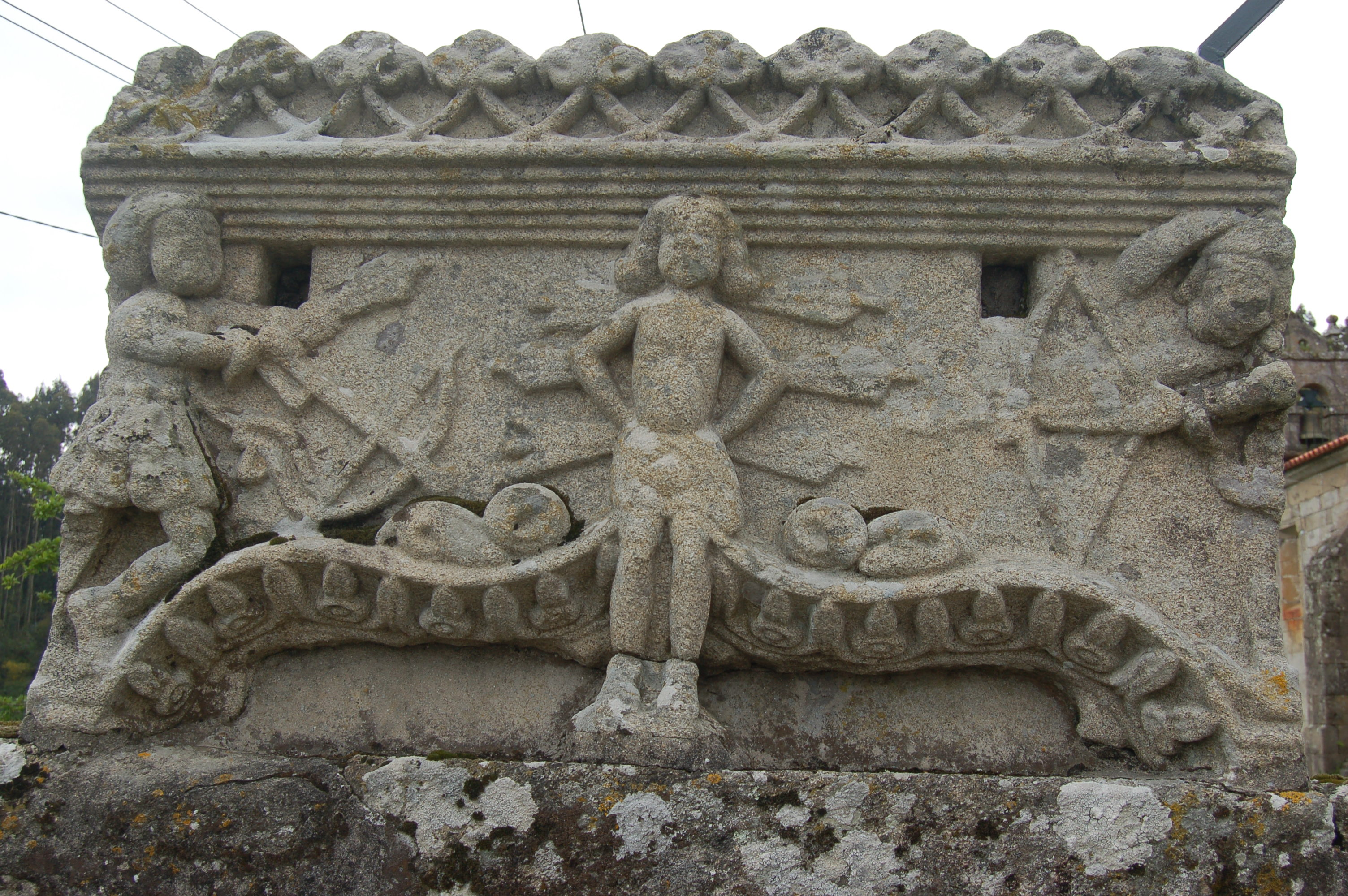 Peza do baldaquino de San Pedro de Bordóns (Sanxenxo). Martirio de san Sebastián, con dous saións disparándolle setas sobre fondo de seis frechas en forma de auréola.